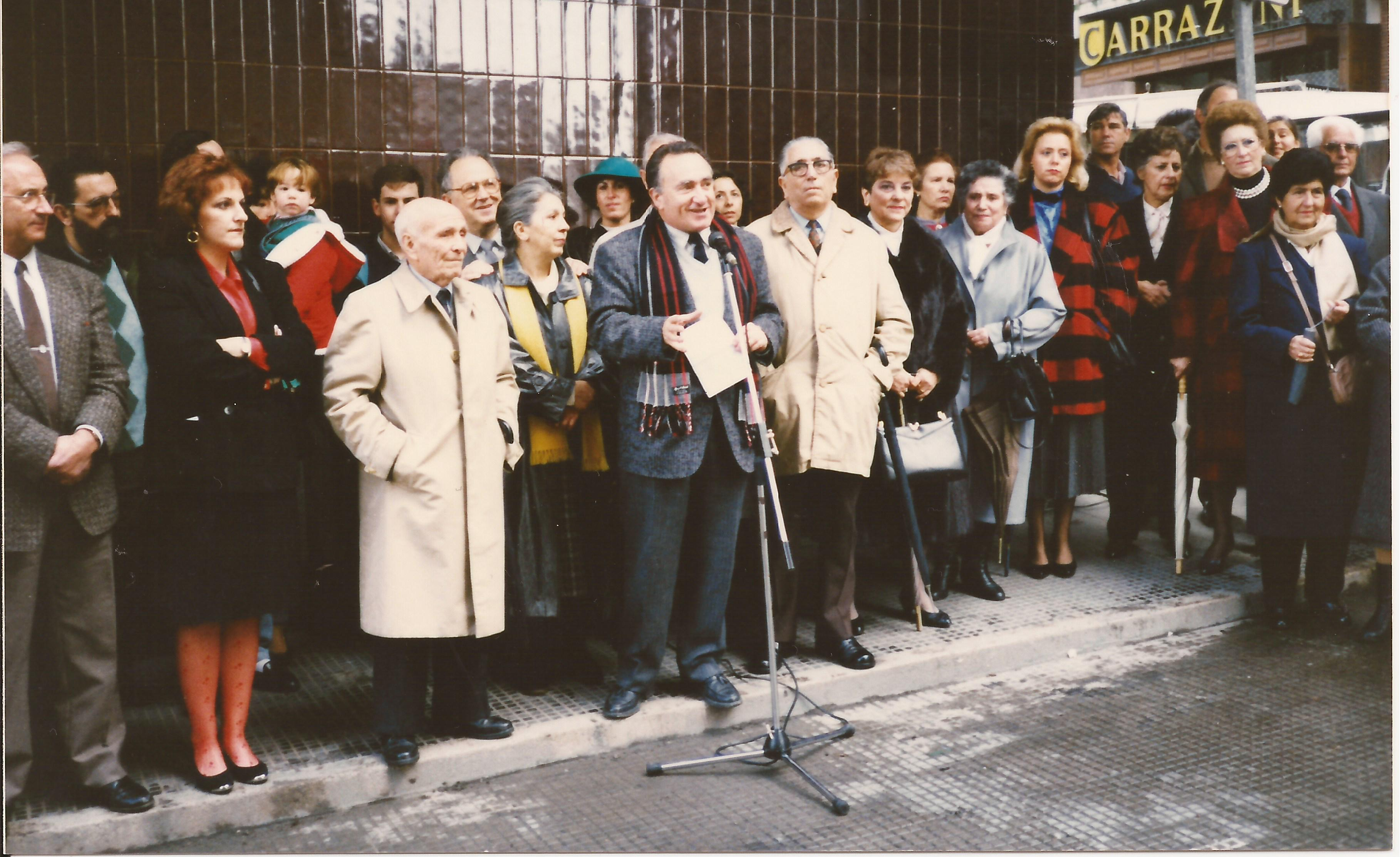 Foto de la solena inaŭguro de la Esperanto-strato en Vigo, 13.12.1987. Prelegas galege la universitata profesoro Xesús Alonso Montero. Apudas lin en helbruna pluvmantelo (kaj sen okulvitroj) la tiama prezidanto de la viga esperanto-grupo "Paco kaj Amo", S-ro Xulio Bueno Cortés, iniciatinto de la projekto pri la esperanto-strato kaj motoro de la movado en Vigo. Ĉeestas ankaŭ geesperantistoj el Vigo, aliaj partoj de Galegio kaj el norda Portugalio. Maldekstre, la magistratanoj Agustín Arca kaj María Xosé Porteiro.